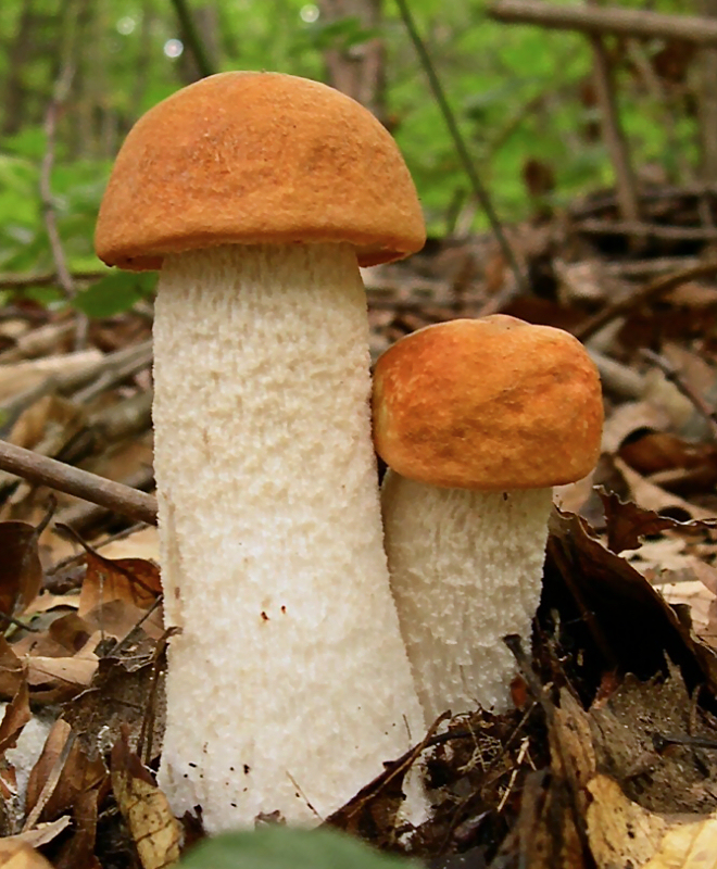 Vörös érdestinóru Leccinum albostipitatum